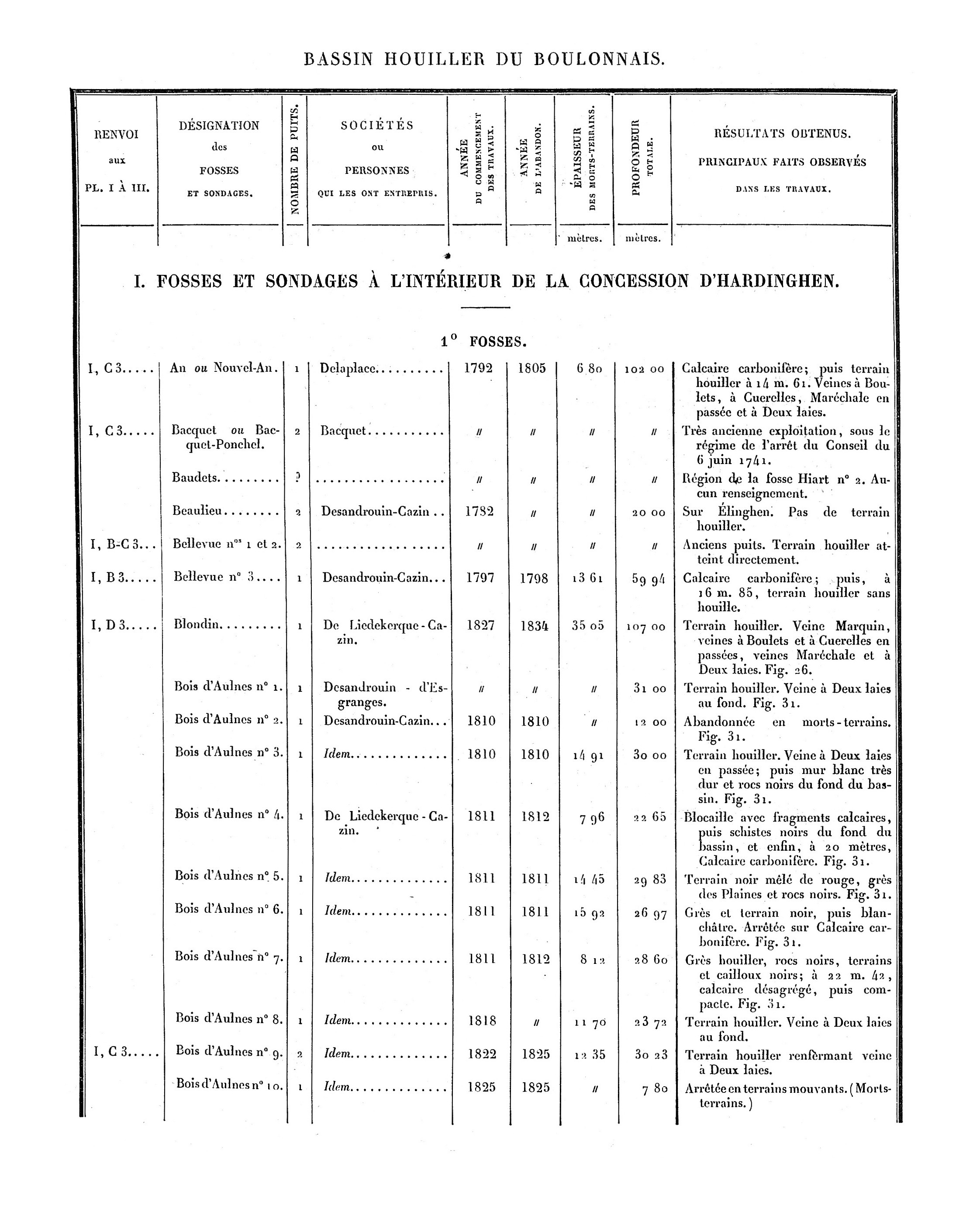 Liste des puits de mine et des sondages. Mines du Boulonnais. Document extrait de Étude des Gîtes Minéraux de la France. Topographie Souterraine du Bassin Houiller du Boulonnais ou Bassin d'Hardinghen, par A. Olry, ingénieur en chef des Mines. Chapitre IX, pages 172 à 189.